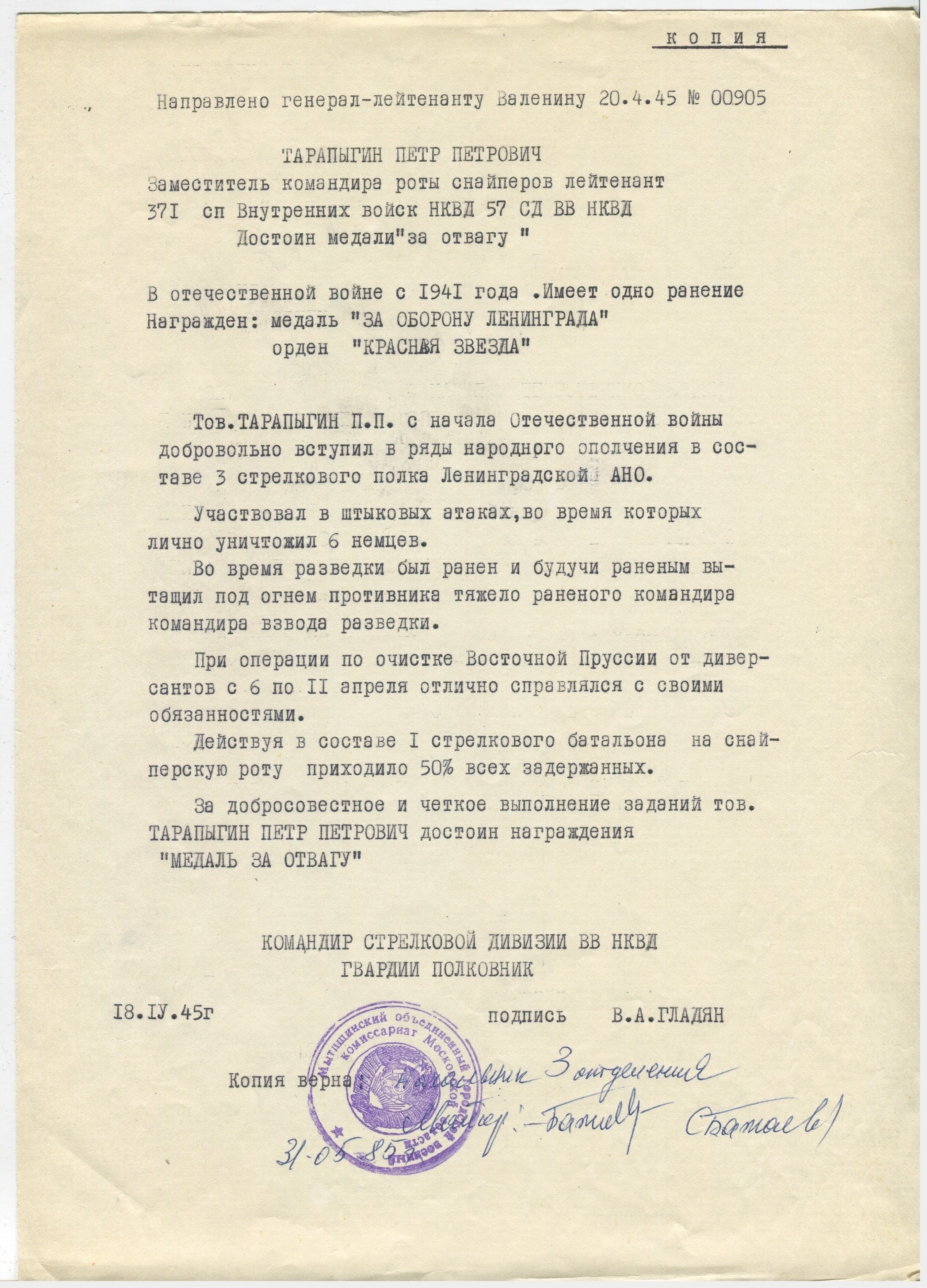 Фото документа о представлении к награде "МЕДАЛЬ ЗА ОТВАГУ" Тарапыгина П. П. от 18 апреля 1945 г.